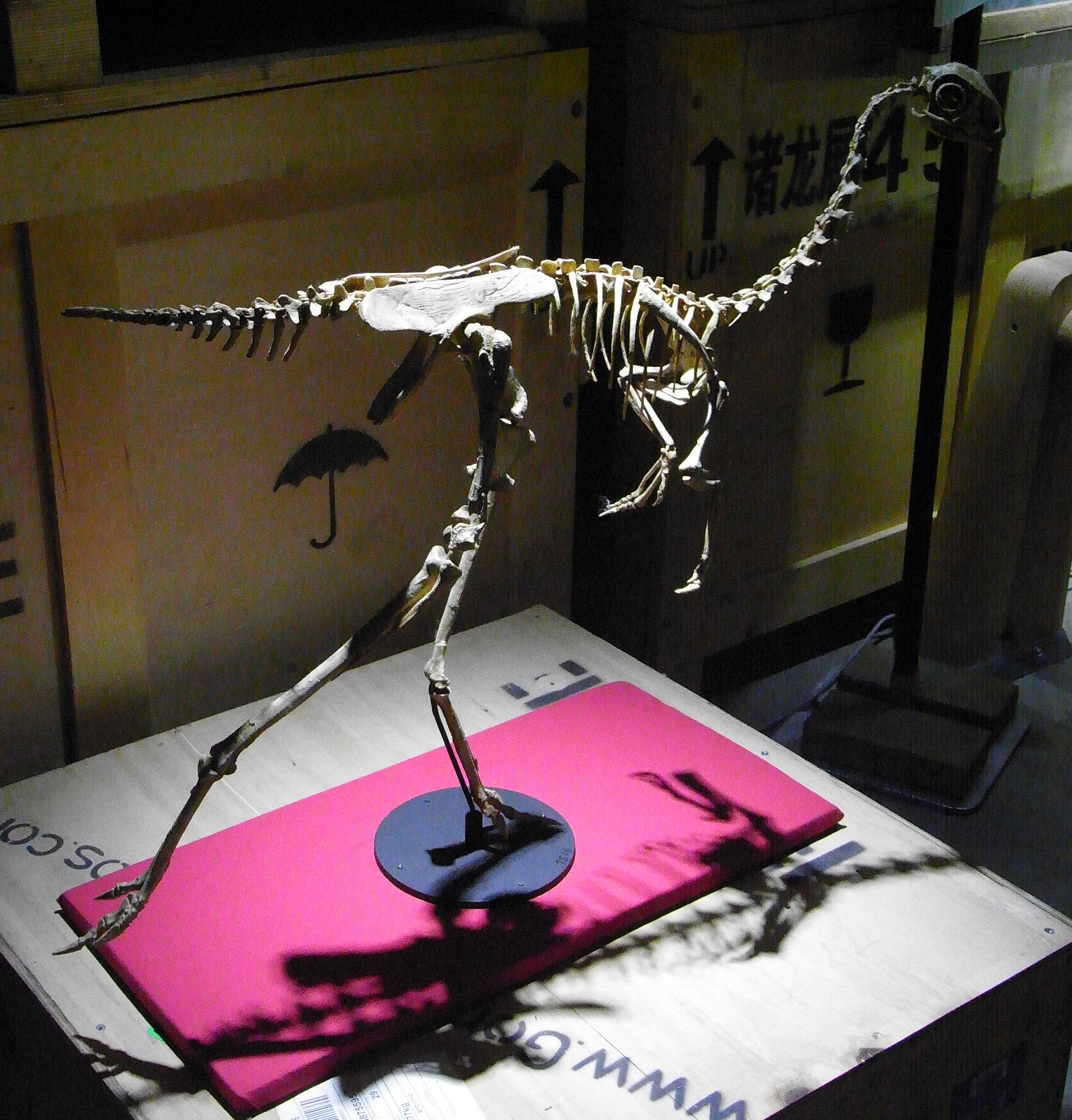 きょろきょろしているに違いない。